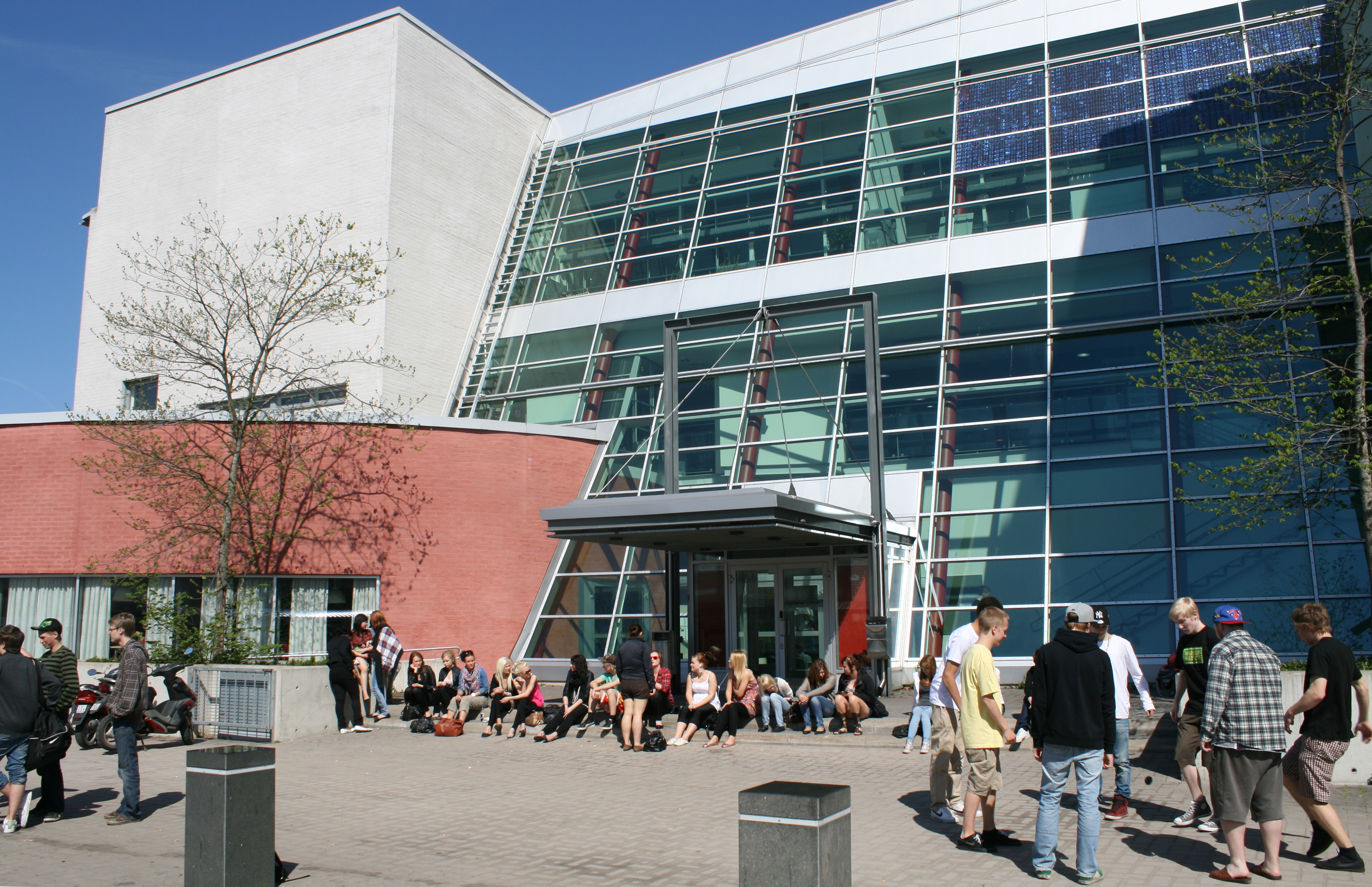 Lumon lukio, Vantaa